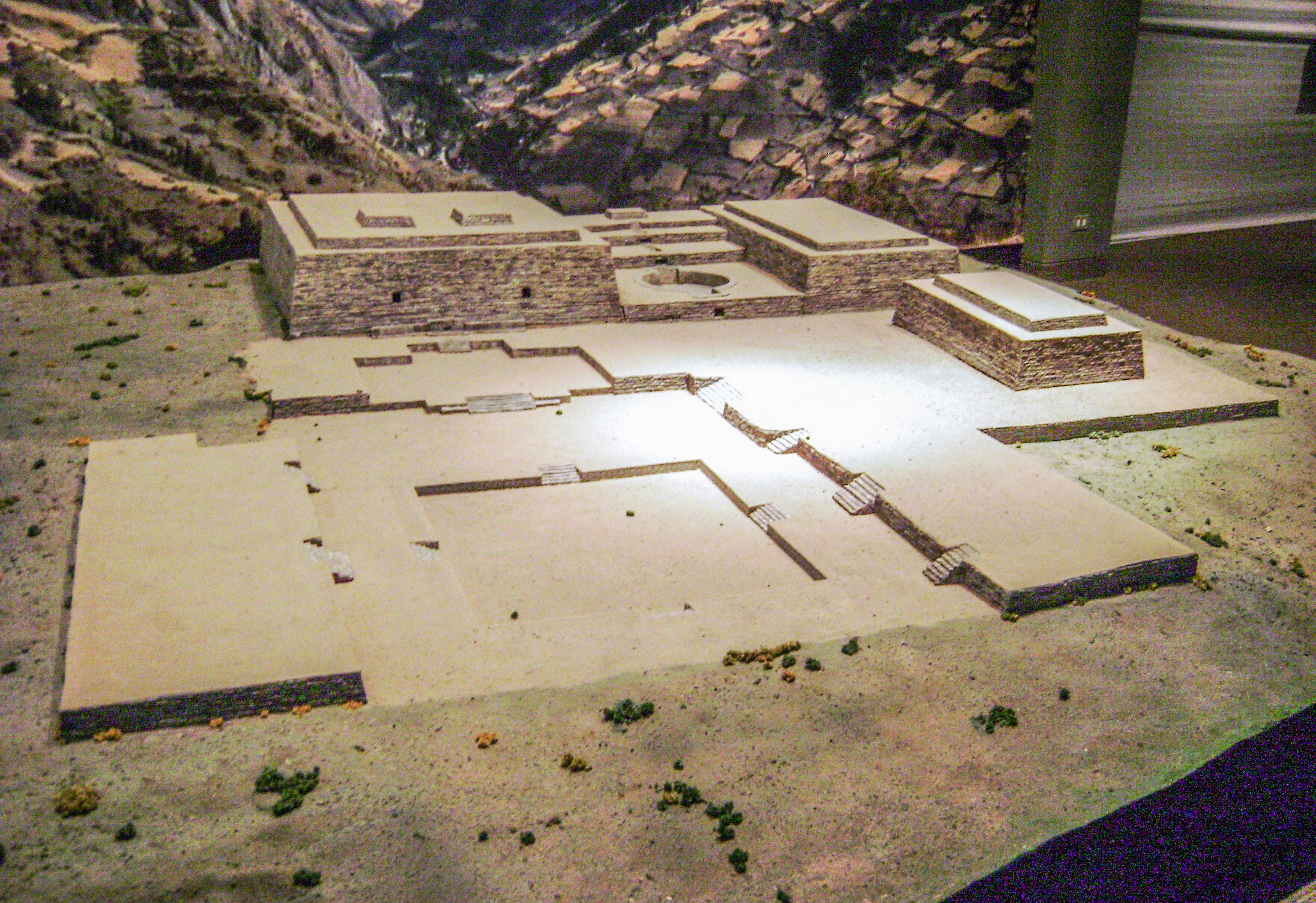 Croquis del complejo Chavín de Huantar. Museo Nacional Chavin de Huantar. Región Ancash - Perú.